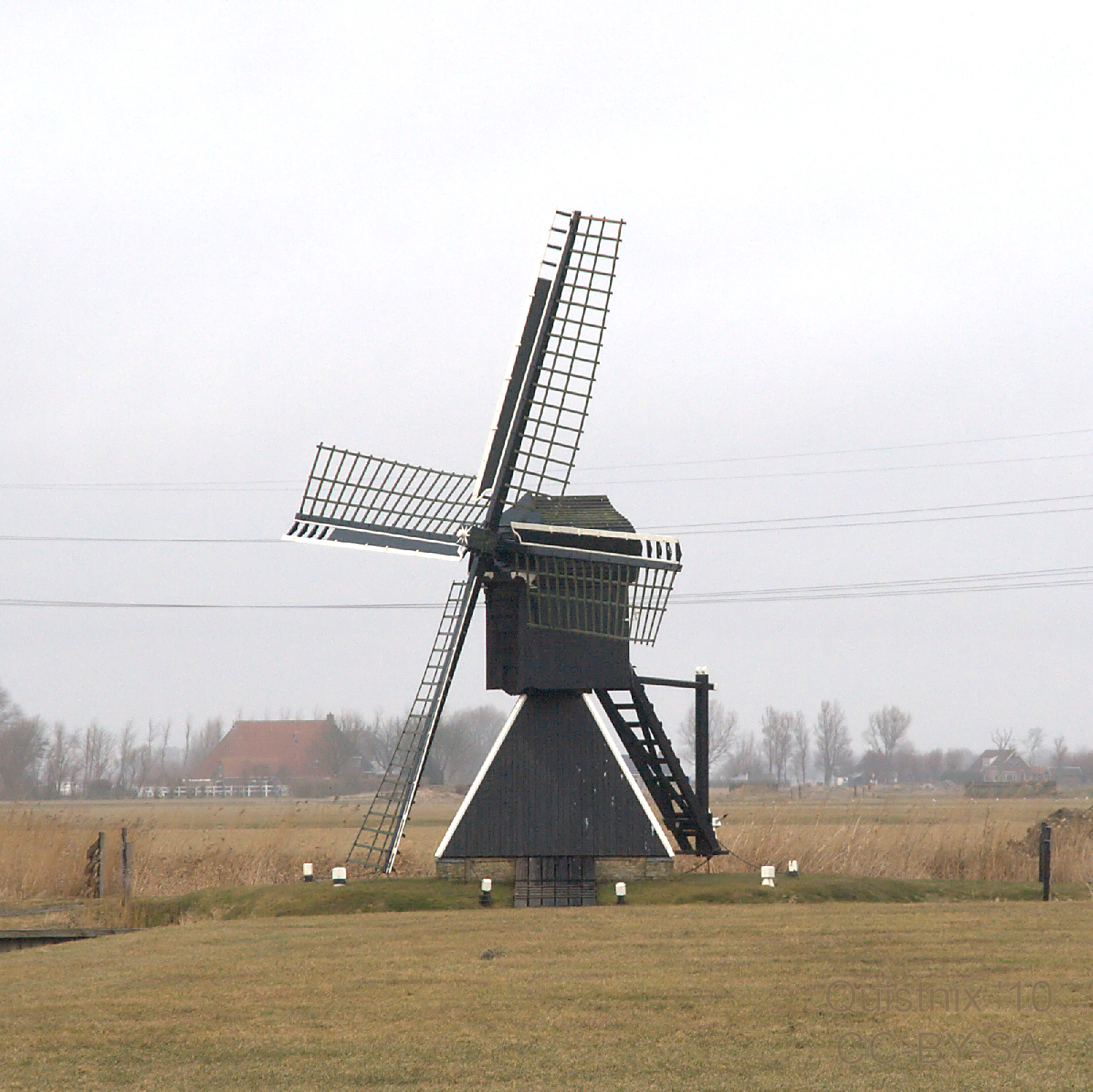 Bolsward - spinnenkopmolen De Greate Klaver